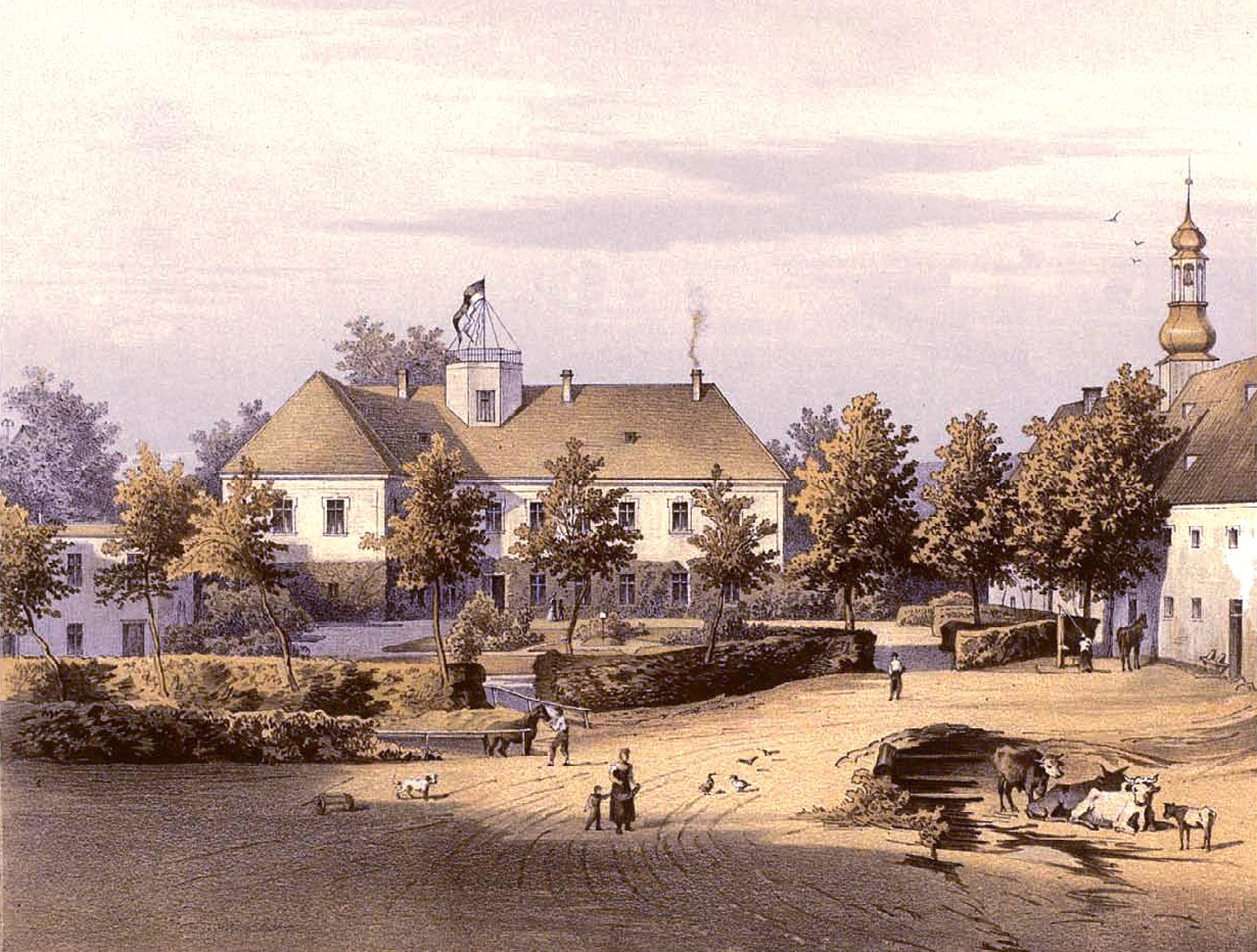 Rittergut Klein Pramsen, Kreis Neustadt, Provinz Schlesien